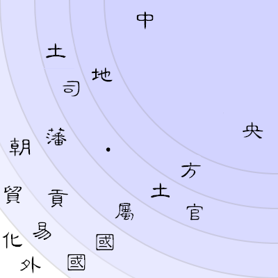 華夷秩序概念。